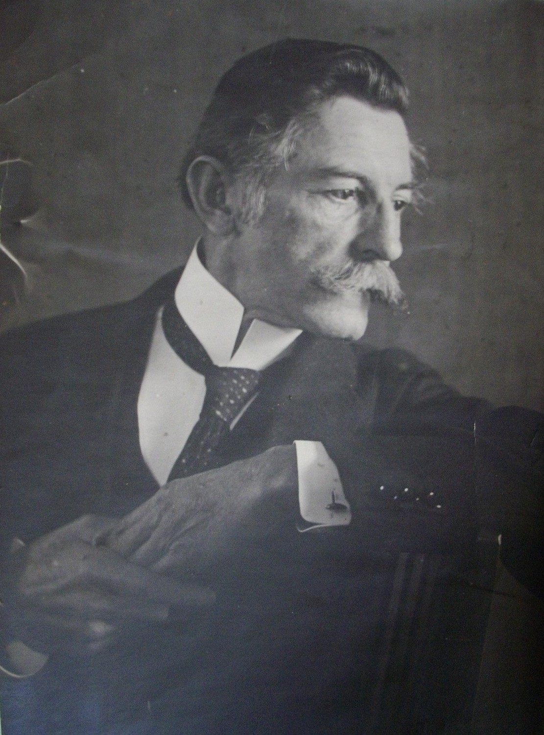 Prof. Dr. phil. Eduard Gustav Adolf Emerich Leisching (1858 - 1938), Kunsthistoriker und Direktor des Museums für angewandte Kunst in Wien